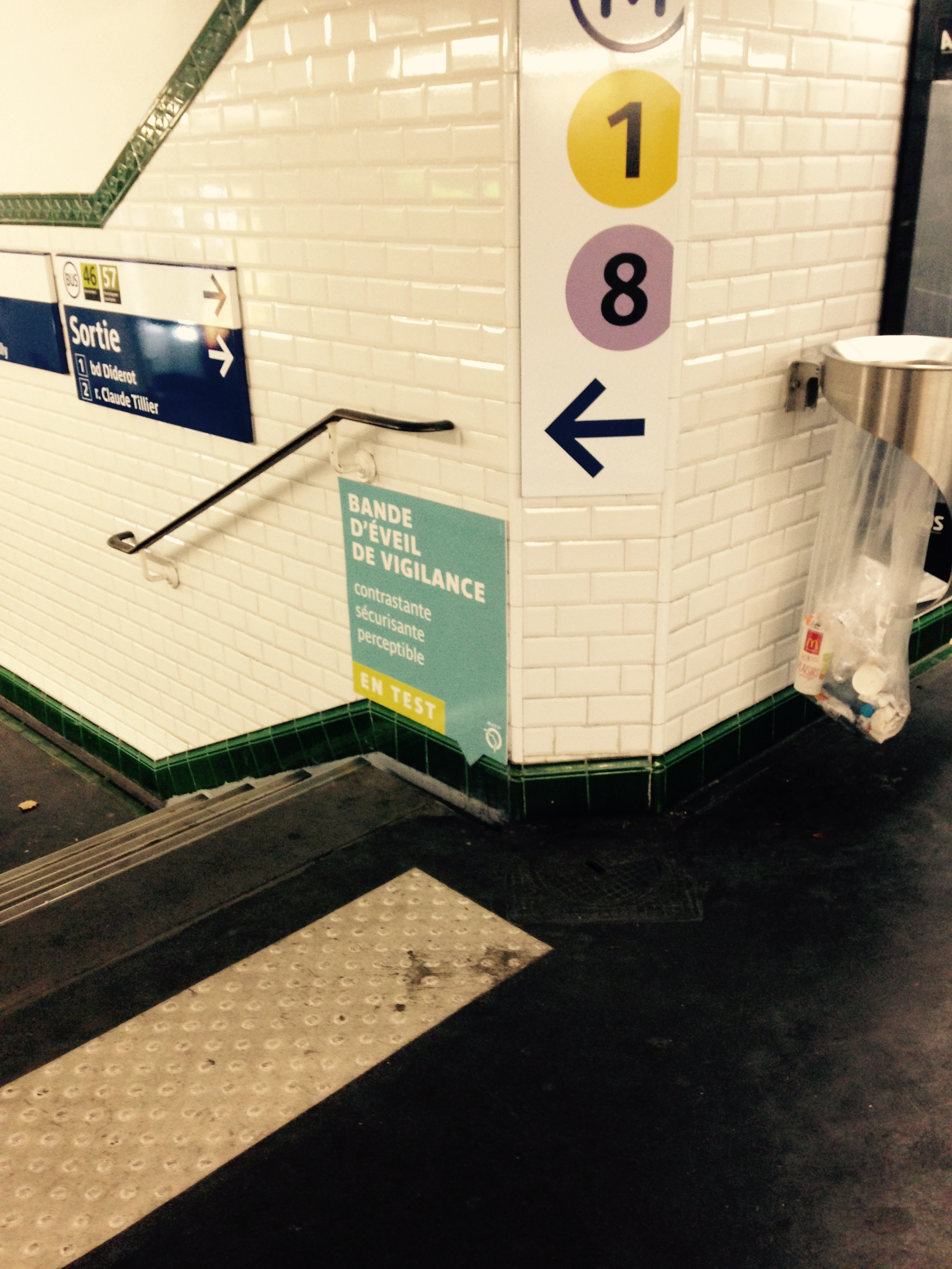 En 2015, test d'équipement pour améliorer l'accessibilité du métro parisien à,la station Reuilly-Diderot : bande podotactile + signe de direction de grande taille vers les quais des lignes 1 et 8